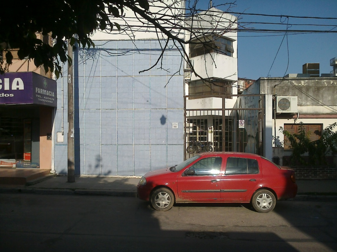 Imagenes del frente del gremio SITRAJ